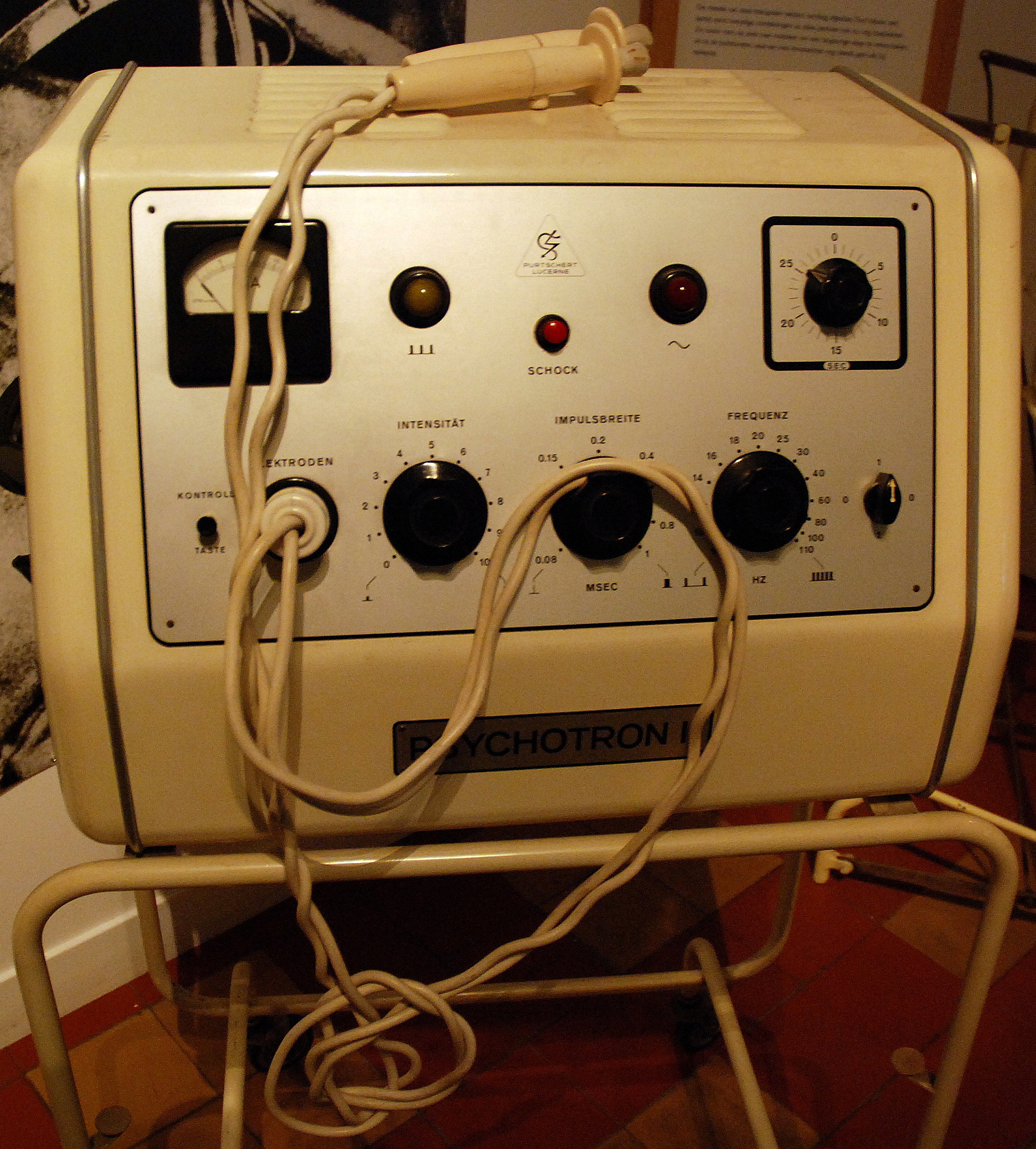 Psychotron, toestel voor het toedienen van electroshocks, in het Museum Dr. Guislain te Gent (België)